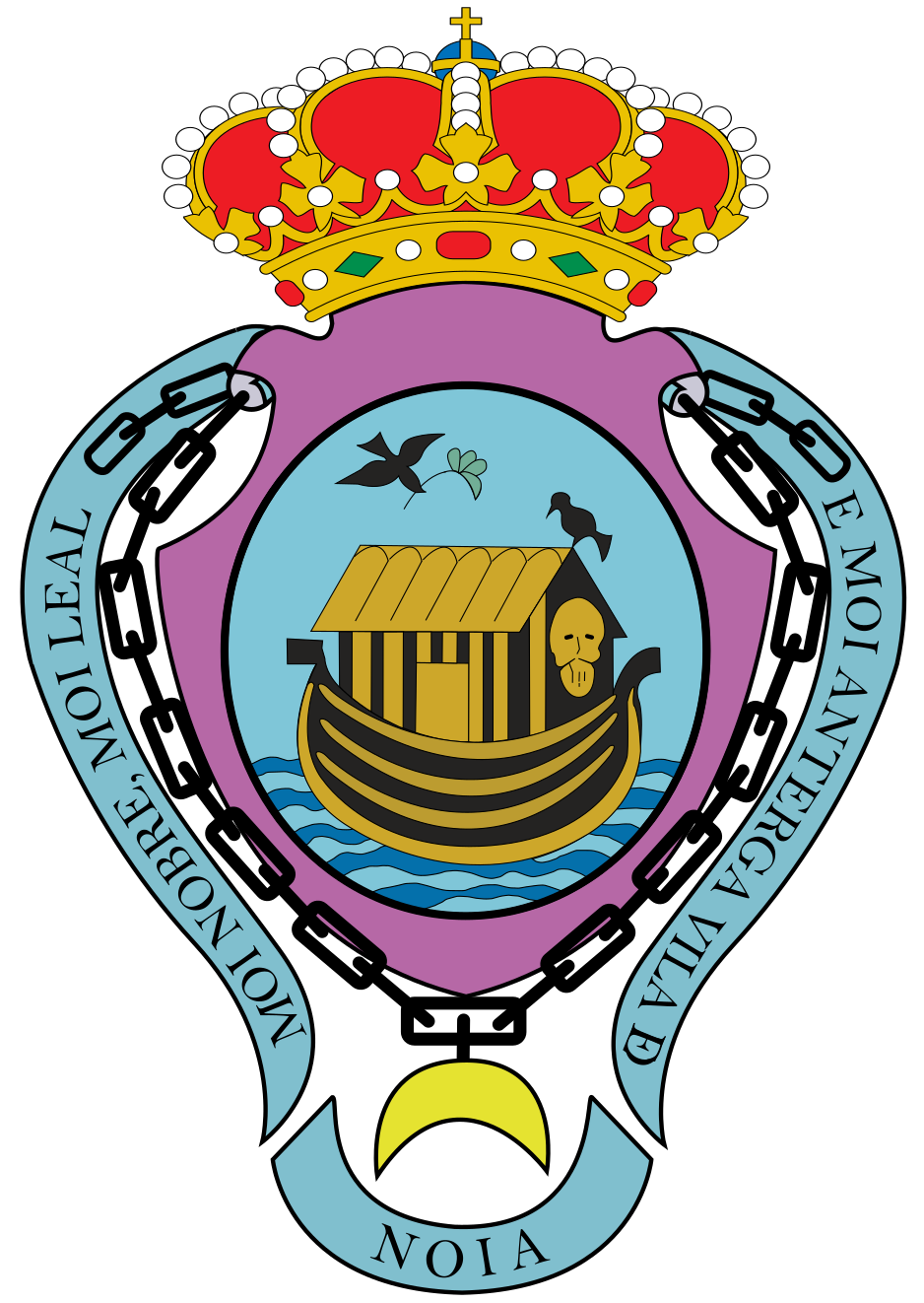 Escudo del municipio español de Noia, A Coruña. (SVG File